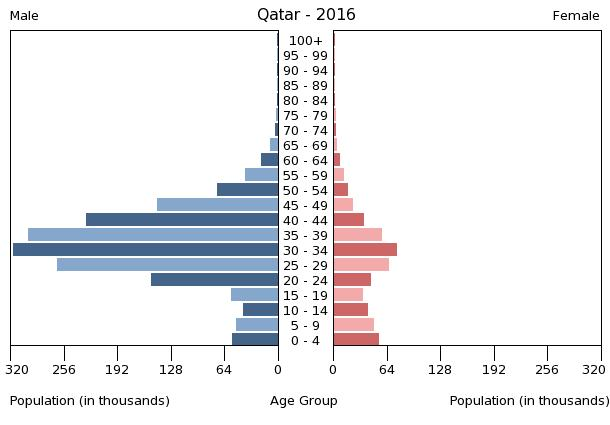 A population pyramid illustrates the age and sex structure of a country's population and may provide insights about political and social stability, as well as economic development. The population is distributed along the horizontal axis, with males shown on the left and females on the right. The male and female populations are broken down into 5-year age groups represented as horizontal bars along the vertical axis, with the youngest age groups at the bottom and the oldest at the top. The shape of the population pyramid gradually evolves over time based on fertility, mortality, and international migration trends.